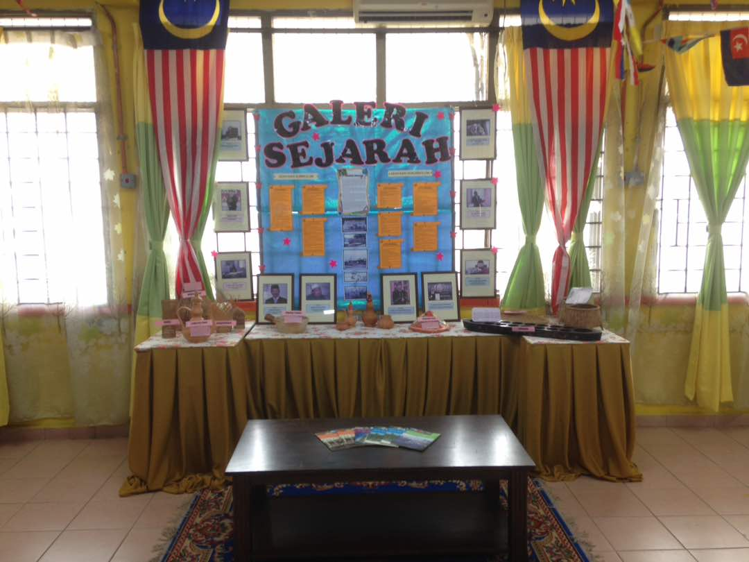 Sudut Galeri Warisan di dalam Pusat Sumber Sekolah